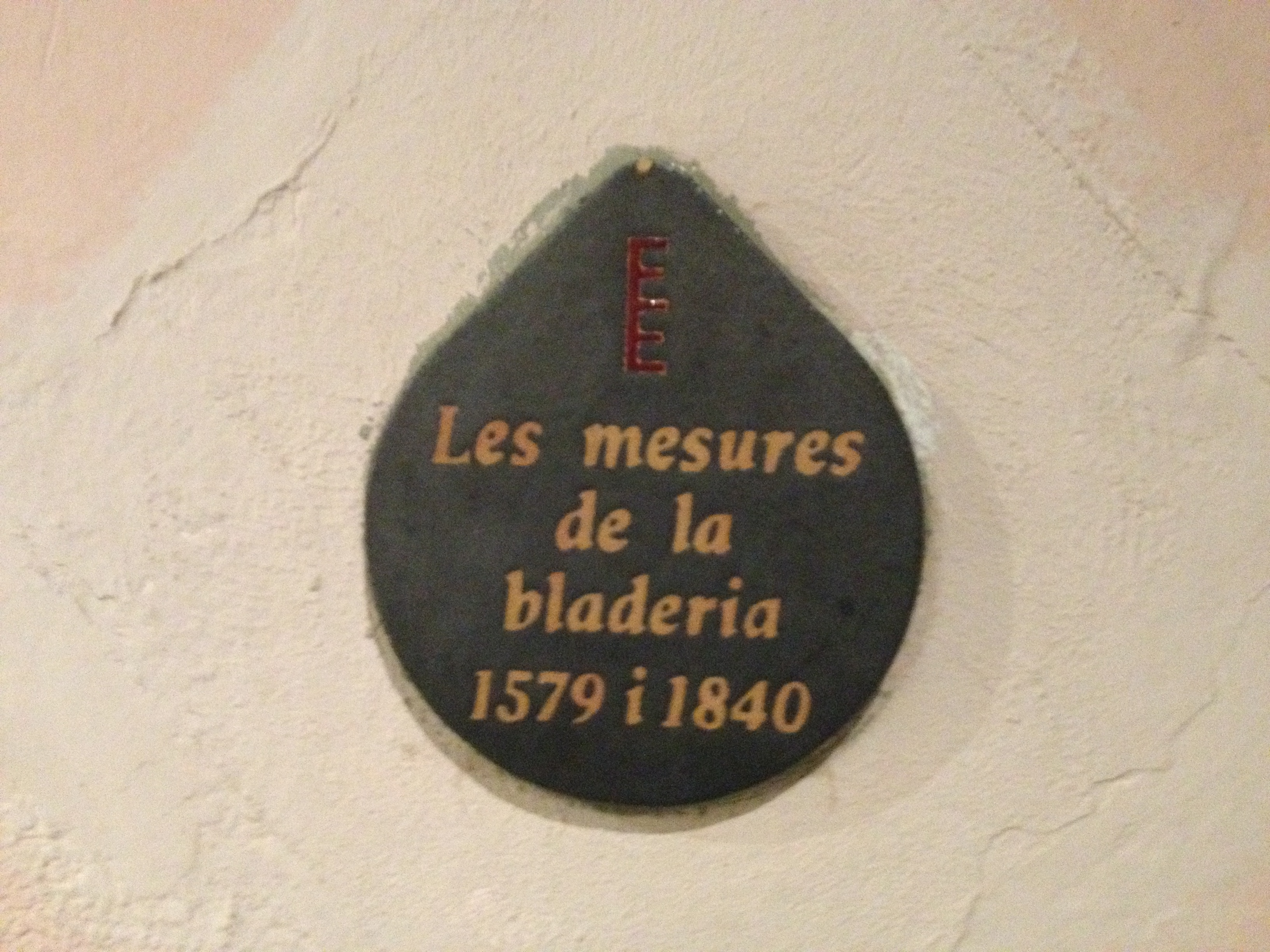 Cartell de les Mesures de la Bladeria de la Seu d'Urgell